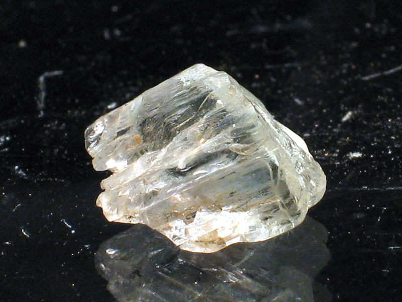 spodumen, pochodzenie Madagaskar; autor zdjęcia Stowarzyszenie Spirifer